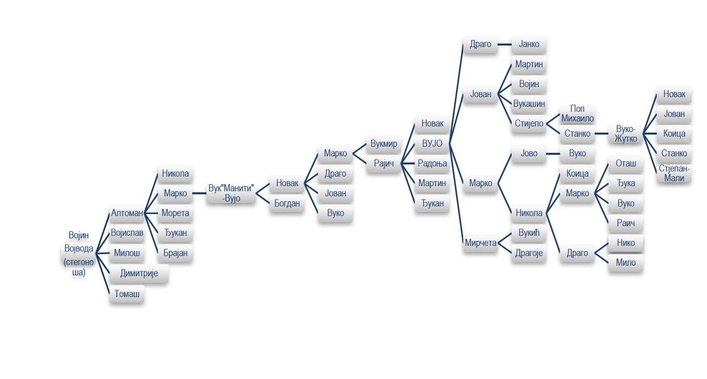 Šema rodoslova dinastije Vujović